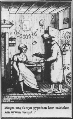 "Mietjen mag ik myn pype nen keer ontsteken aen uywen vierpot ?" (« Mariette, puis-je allumer ma pipe à votre brasier ? ». Illustration gravée de "Jellen en Mietje" (1815) de Karel Broeckaert.